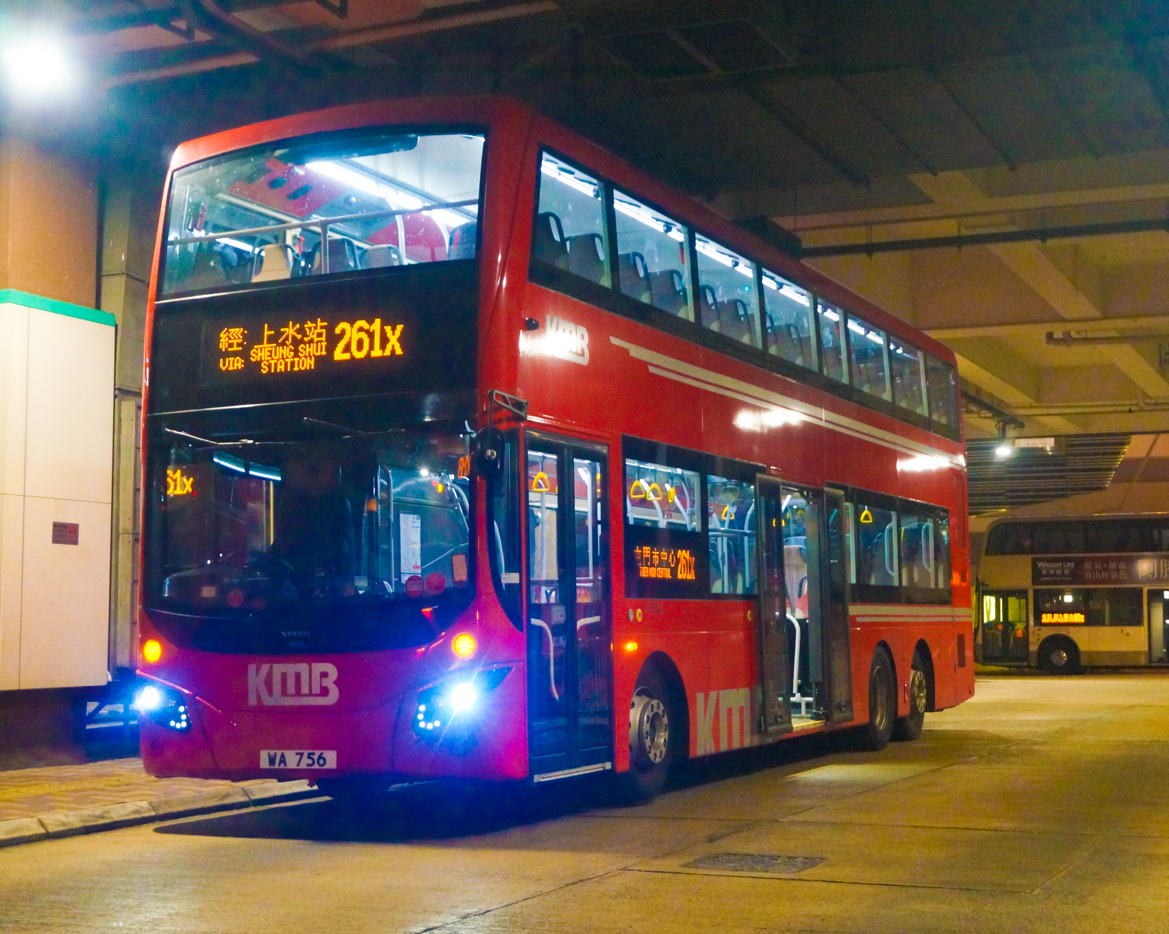 （WA756/AVBML1）行駛九龍巴士261X線